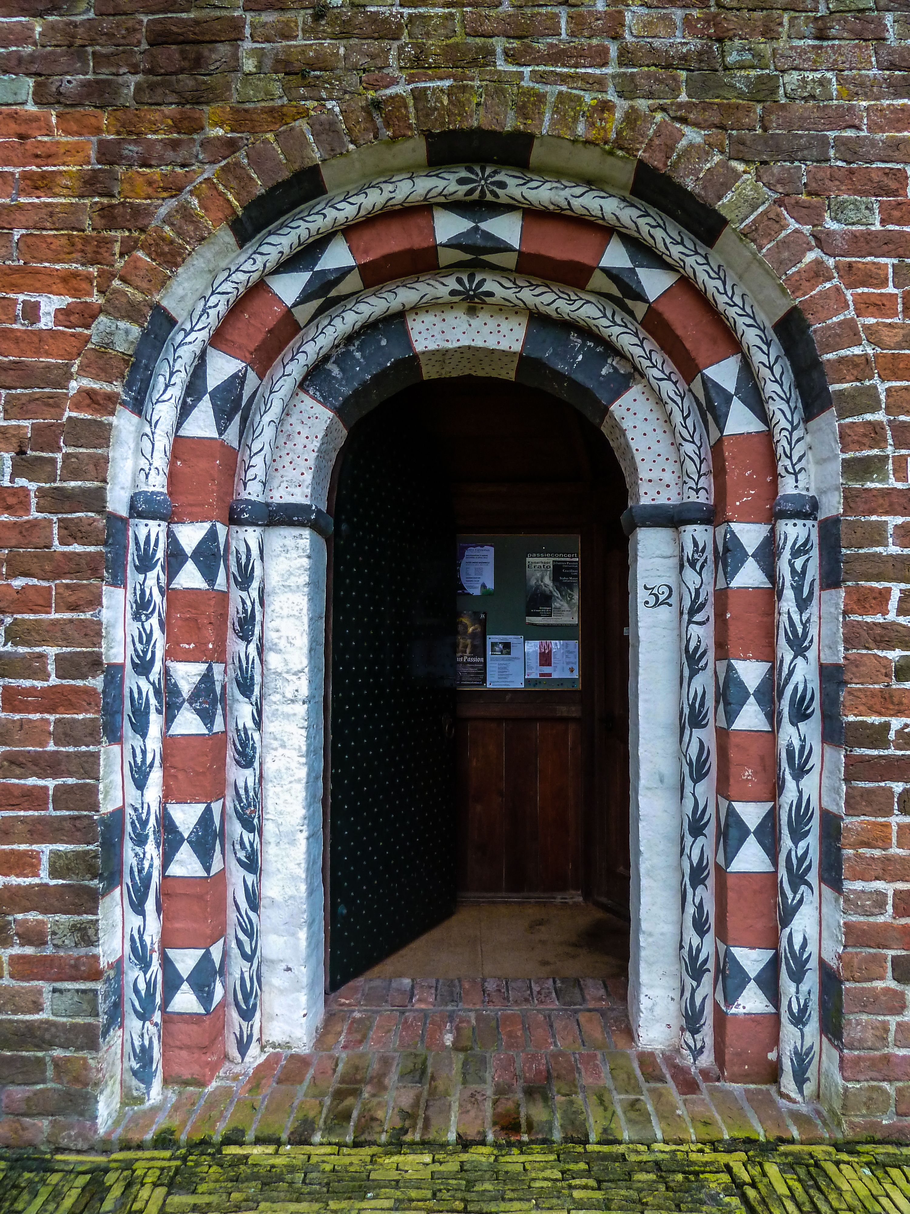 Noordingang van de Jacobuskerk in Zeerijp met arabesken rondom.